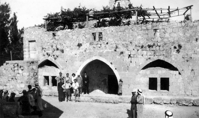 חזית הכנסיה היוונית בעבוד אייר תרצ"ב מאי 1932 - חיים ברגר